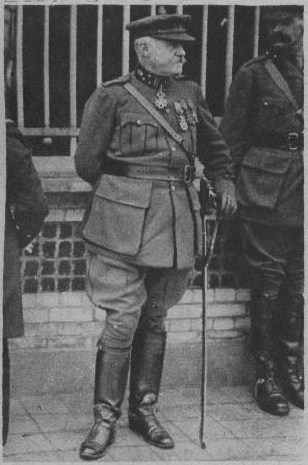 Le général Félix Wielemans, chef d'état-major de l'armée Belge.